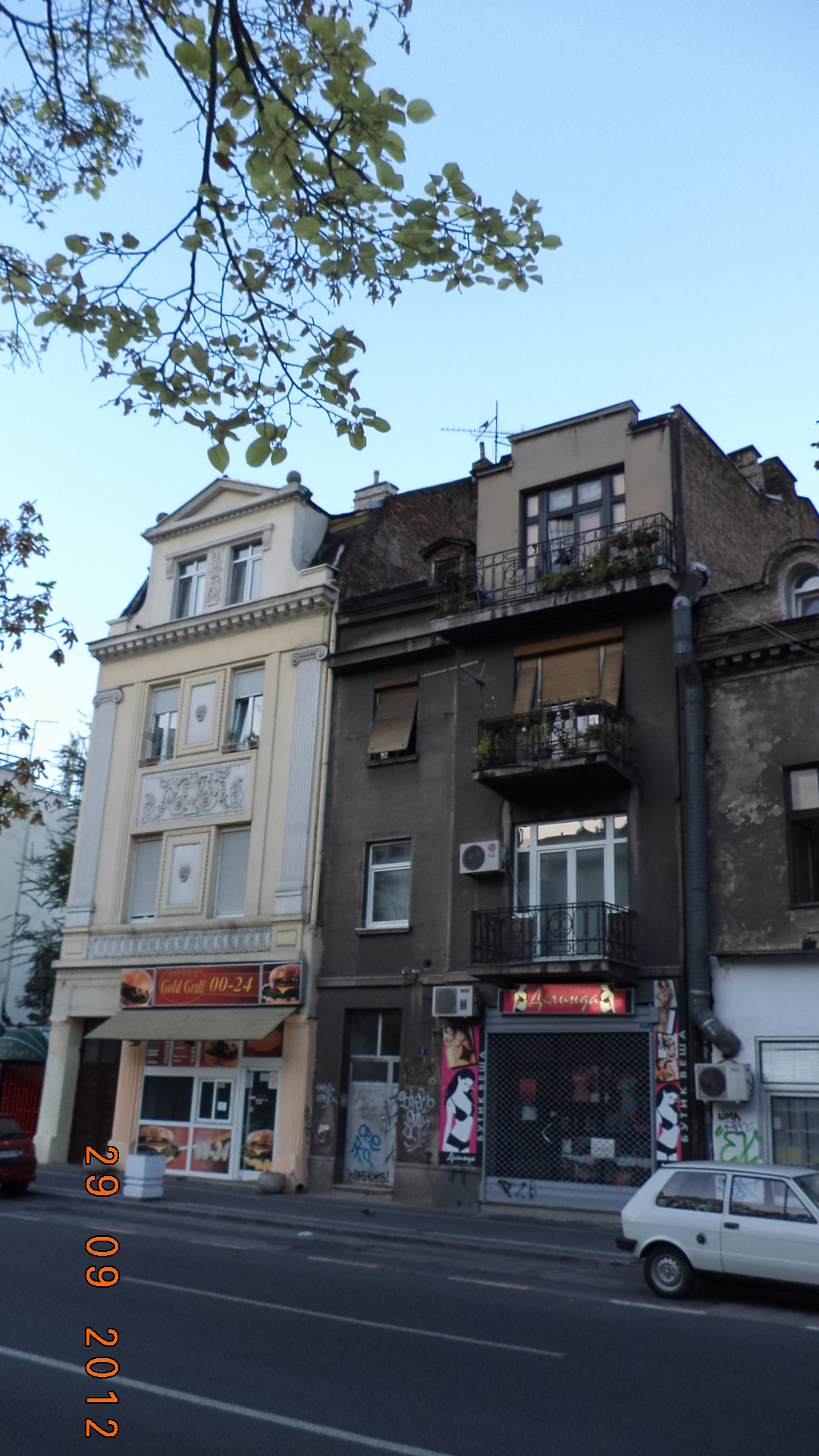 Абаџијске куће